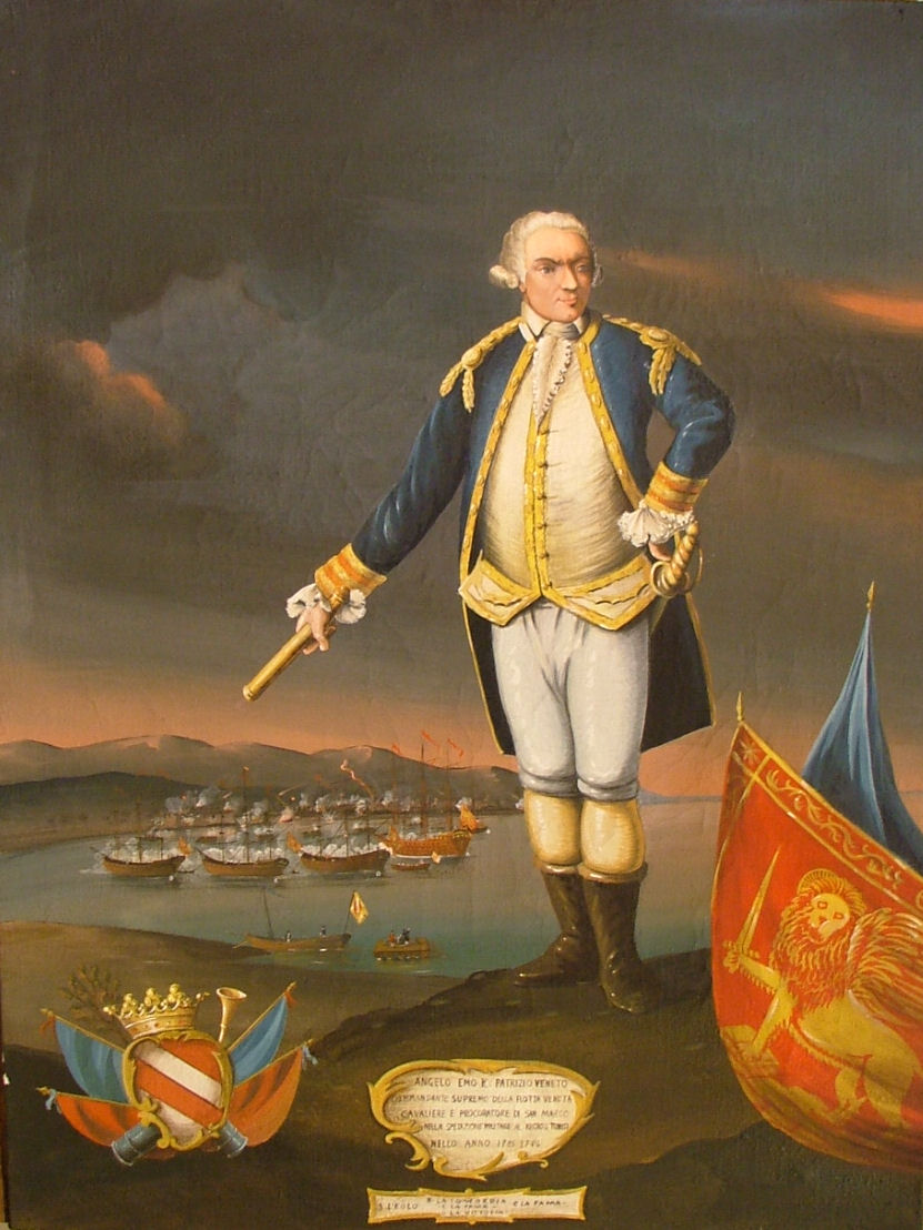 ANGELO EMO K. PATRIZIO VENETO COMMANDANTE SUPREMO DELLA FLOTTA VENETA CAVALIERE E PROCURATORE DI SAN MARCO NELLA SPEDIZIONE MILITARE AL REGNO DI TUNISI NELLO ANNO 1785 -1786